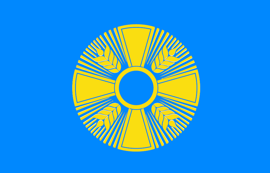 Прапор Бобринецького району